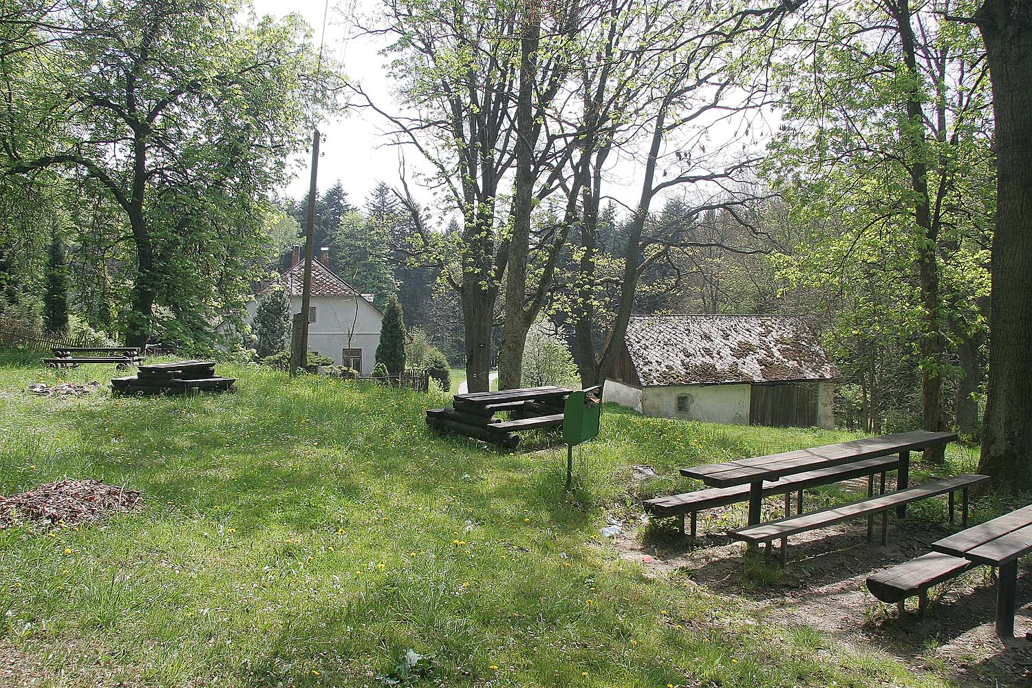 Pohled od poutní kaple Panny Marie Sněžné v bývalých lázních Balda (samy lázně leží na katastru obce Stašov, kaple a myslivna již na katastru obce Jedlová, vše okres Svitavy)